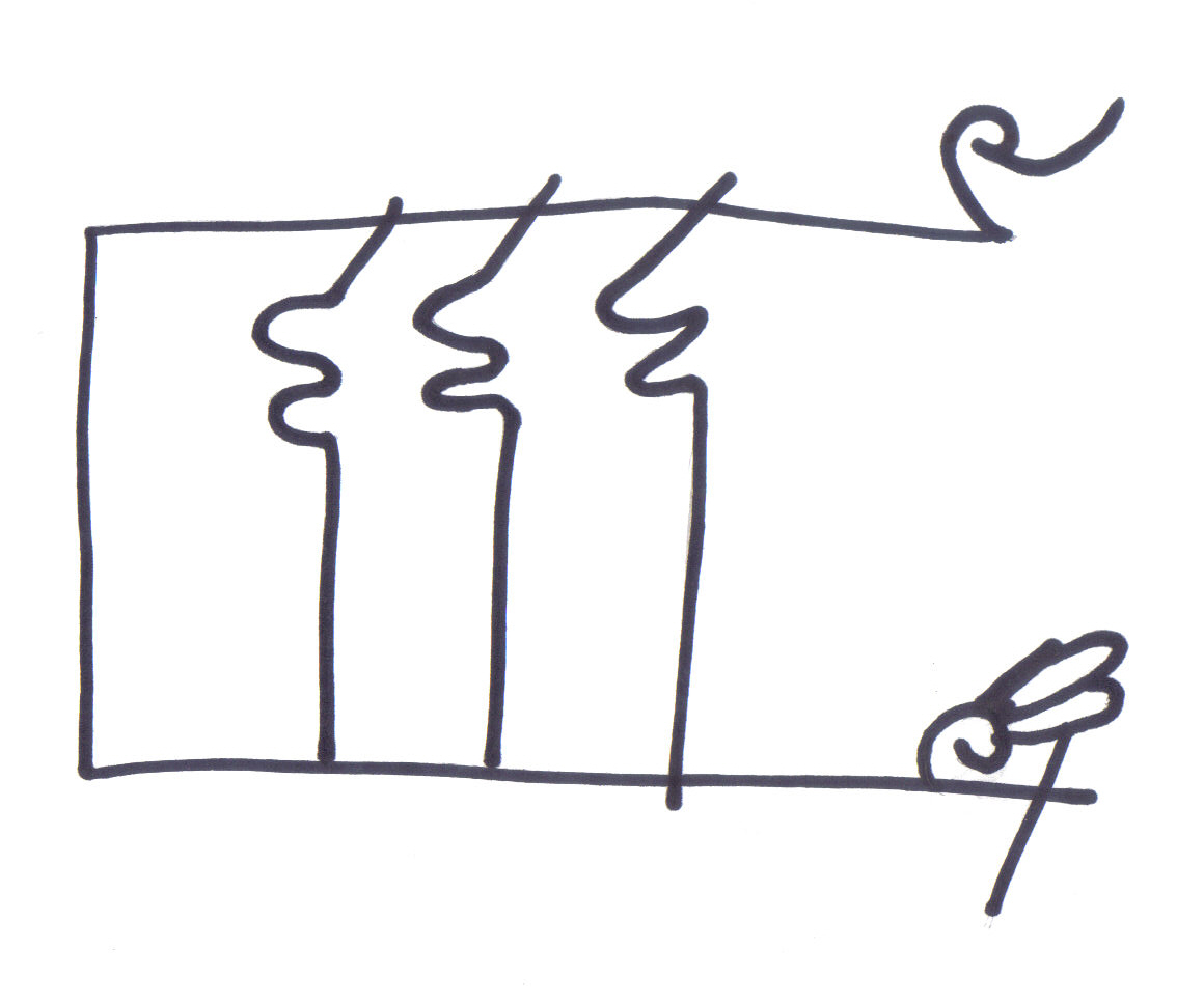 Signo de Diego Muñoz de Saldaña en la documentación. Referencia: Rodríguez Fernández, Justiniano (1998), Ramiro II, rey de León, Burgos: La Olmeda. ISBN 84-89915-01-6.